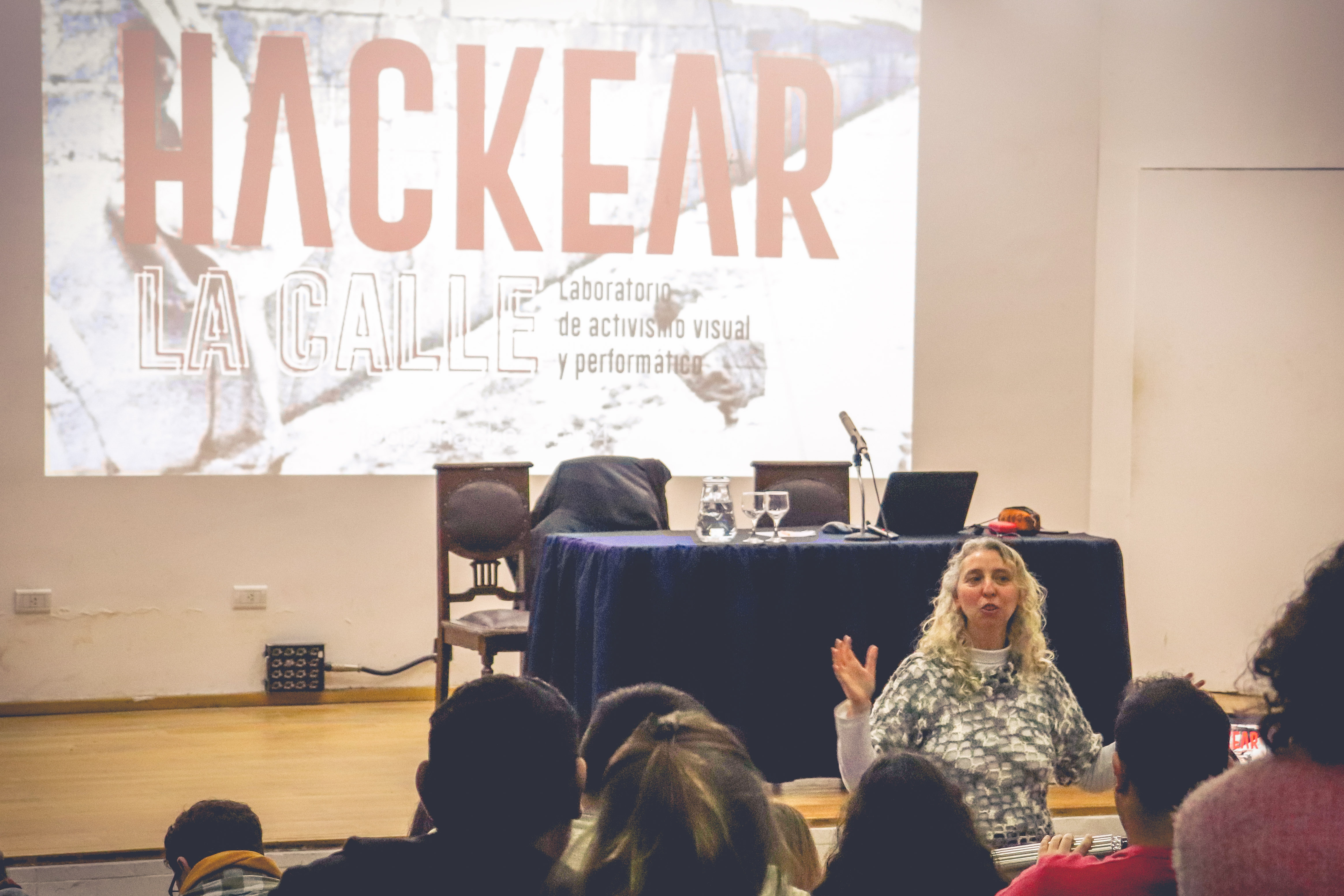 Cora Gamarnik - Conferencia central de la actividad "Hackear la calle" realizada en Paraná, Entre Ríos, entre la Cooperativa Cultural Antílope y la Facultad de Ciencias de la Educación de la Universidad Nacional de Entre Ríos. Junio de 2019. Algunas de estas imágenes pueden aparecer en la nota periodística "Cora Gamarnik: “Hay imágenes tan poderosas que pueden cambiar la historia”"de la Facultad de Ciencias de la Educación - UNER